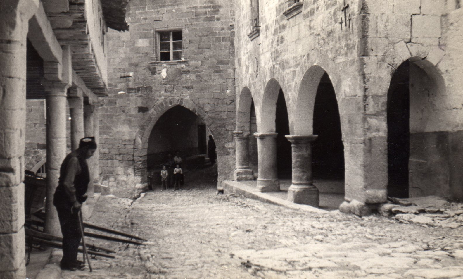 plaça de l'ajuntament.